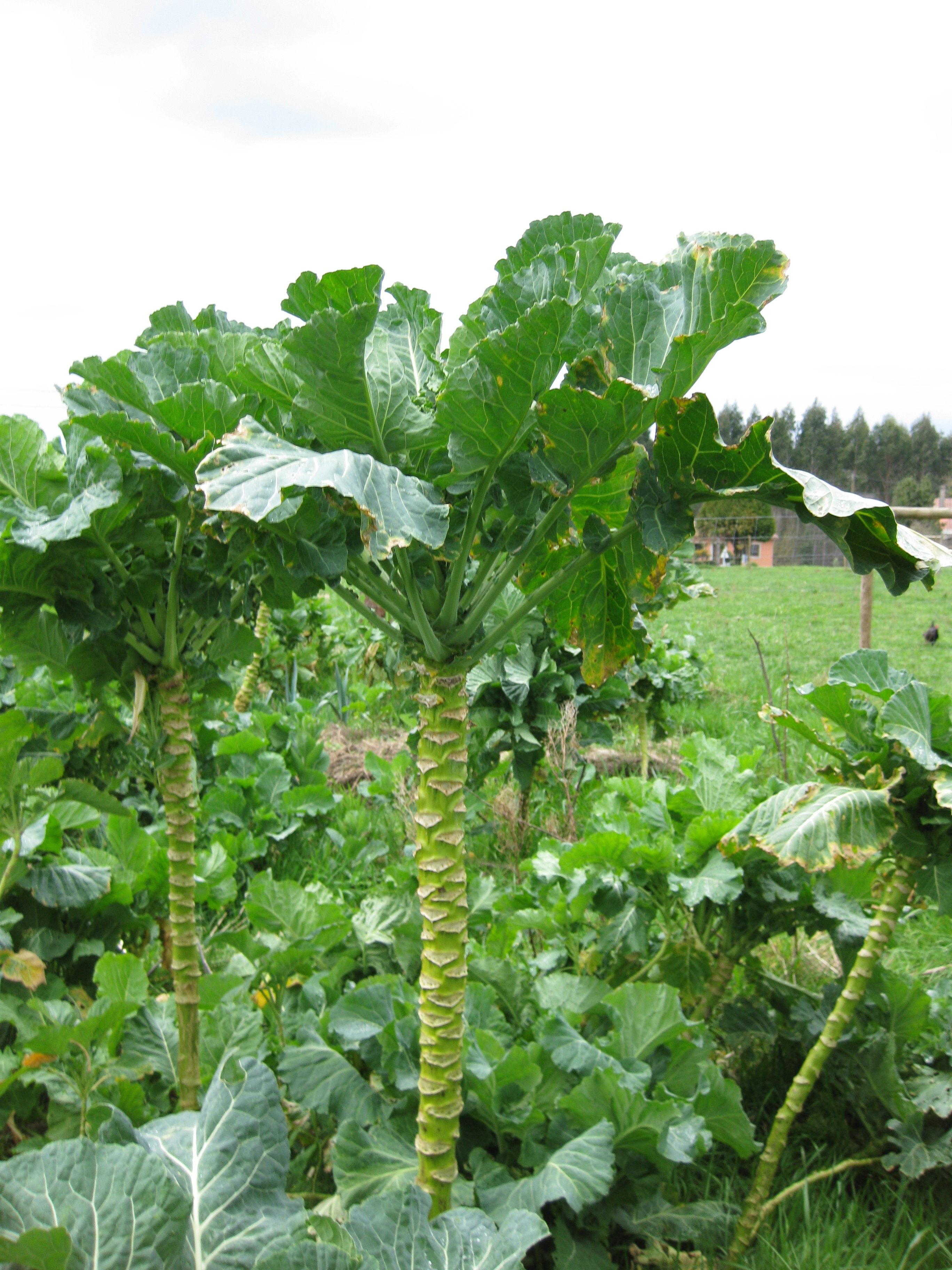 verça galega (Brassica oleracea var. acephala), berza, berça, couve-galega